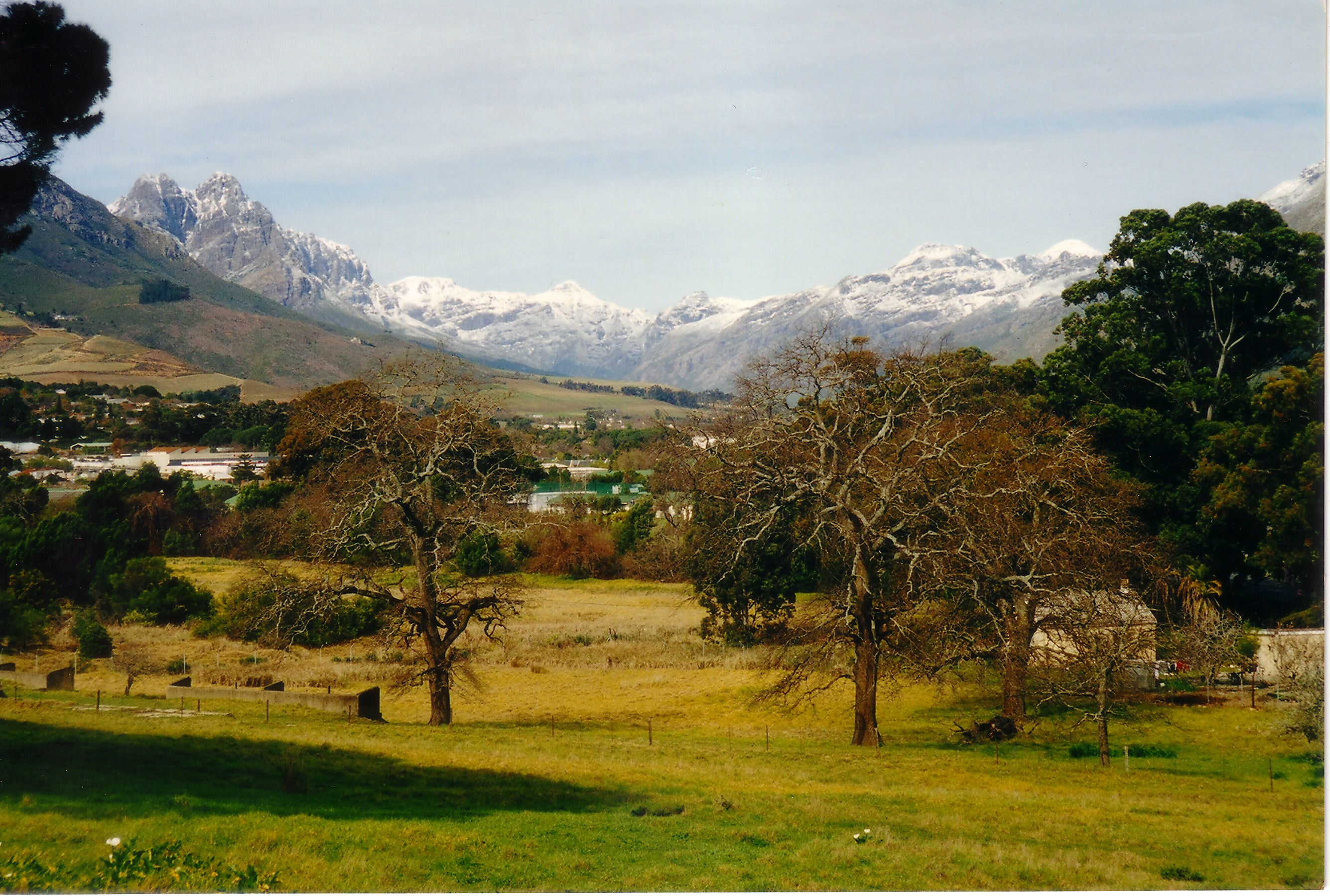 Andres de Wet - Taken by myself in August 2004